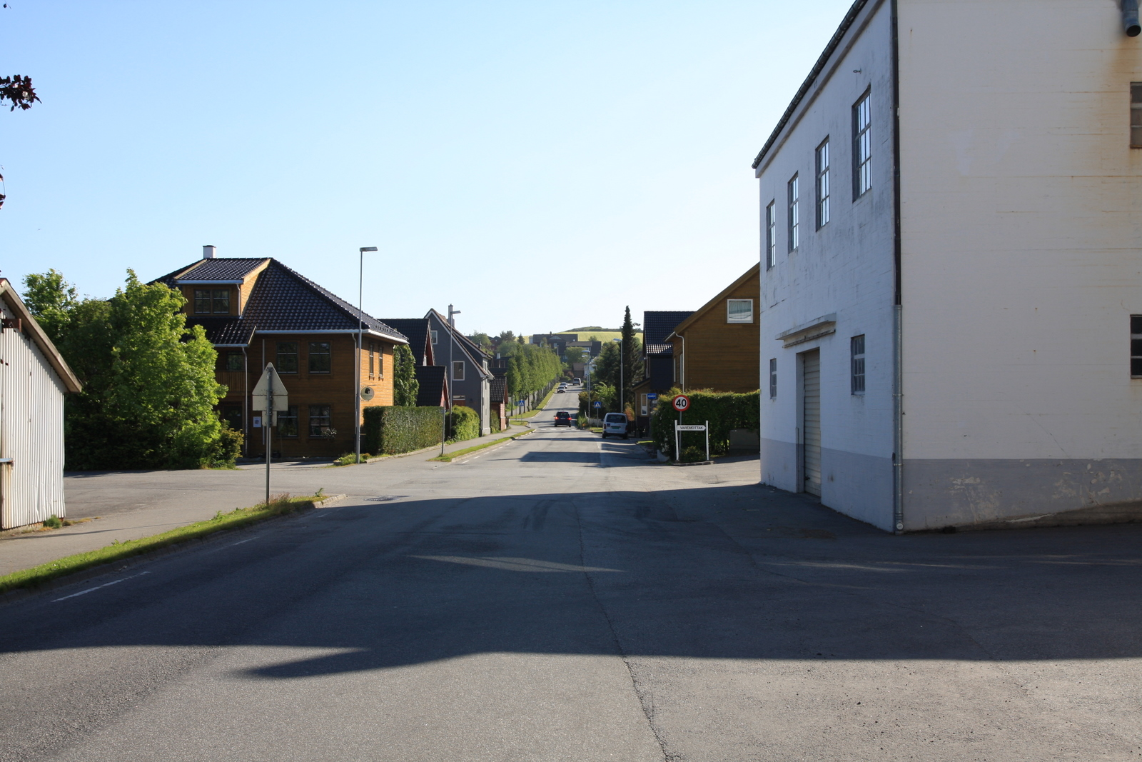 Fylkesvei 252 Lalandsveien